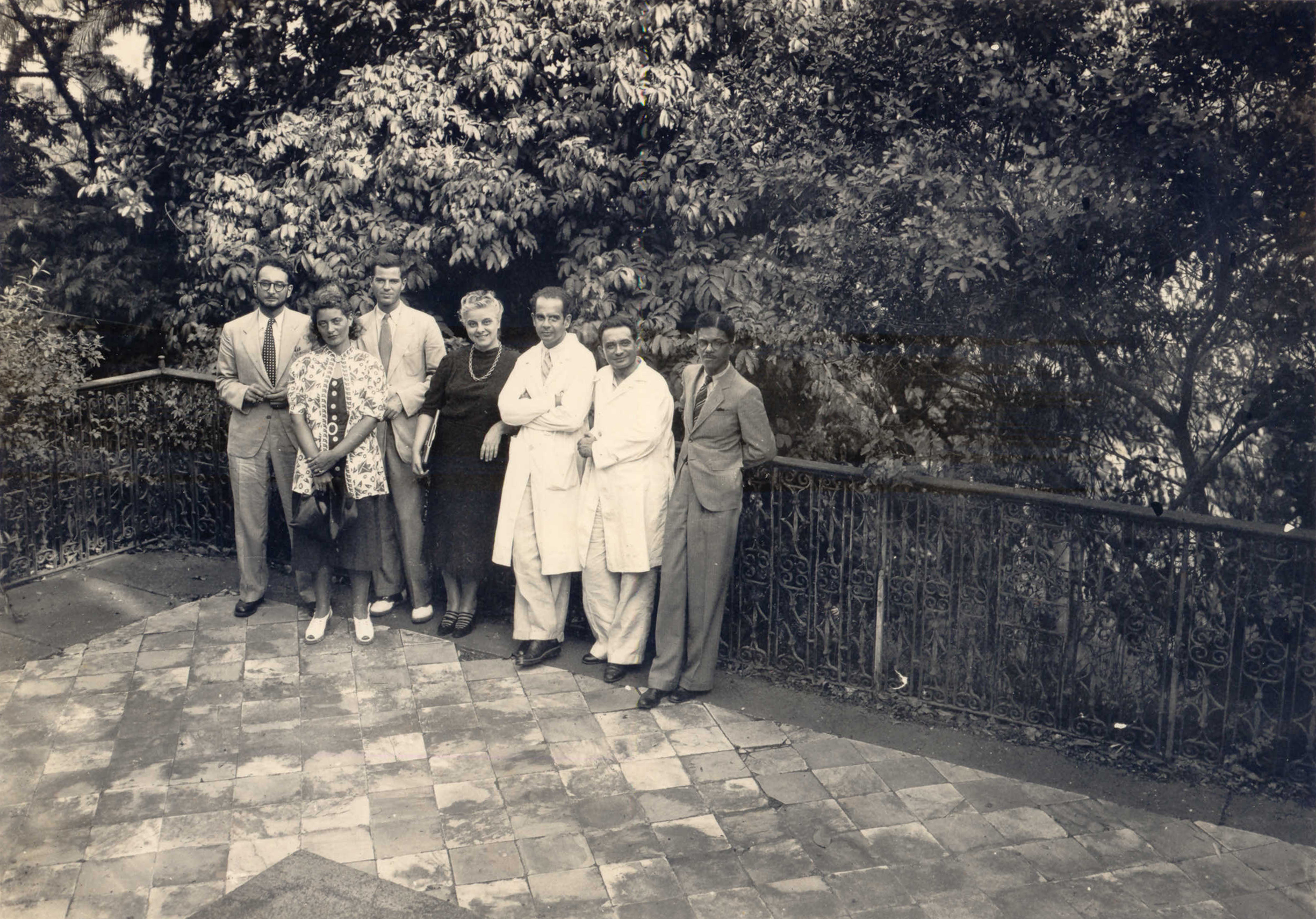 Claude Lévi-Strauss em visita ao Museu Nacional. Fotografia, acervo do Museu Nacional/UFRJ- Rio de Janeiro, Brasil. Identificados da esquerda para a direita: 1 Claude Levi-Strauss; 2 Ruth Landes, da Universidade de Columbia; 3 Charles Walter Wagley, da Universidade de Columbia; 4 Heloísa Alberto Torres, do Museu Nacional; 5 Luís de Castro Faria, do Museu Nacional; 6 Raimundo Lopes da Cunha, do Museu Nacional; 7 Edison Carneiro. Nota: No Relatório do Museu Nacional, referente ao período 1931-1940, consta que "Um grupo de antropólogos da Universidade de Columbia, discípulos do prof. F. Boas, fez estágio no Brasil durante cerca 'de dois anos, trabalhando em cooperação estreita com a Seção de Antropologia". Entre eles: Ruth Landes e Charles Wagley (MN.DR, classe 146.0, relatório 1931-1940).